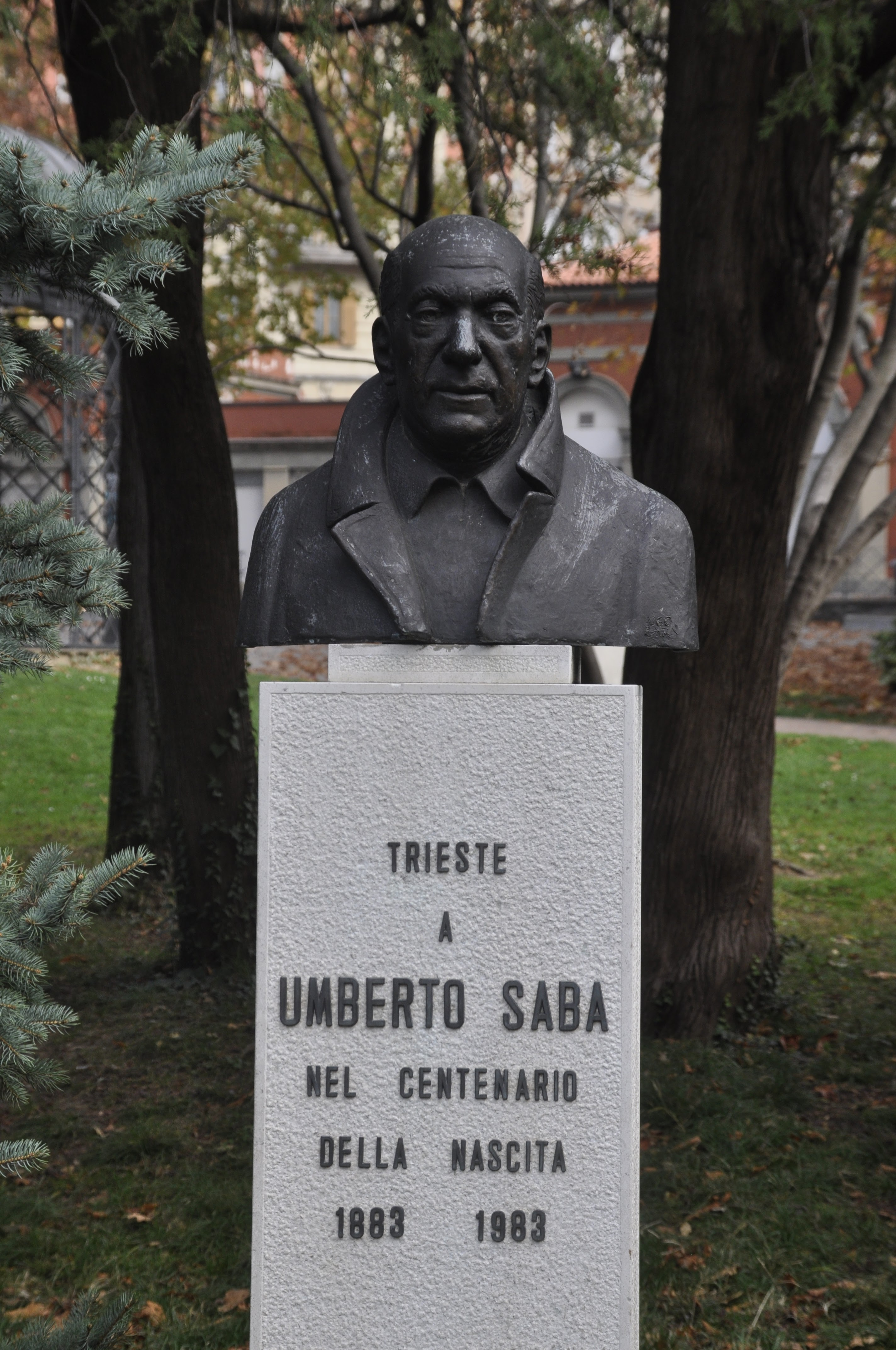 Busto de Umberto Saba en el Jardín Público de Trieste